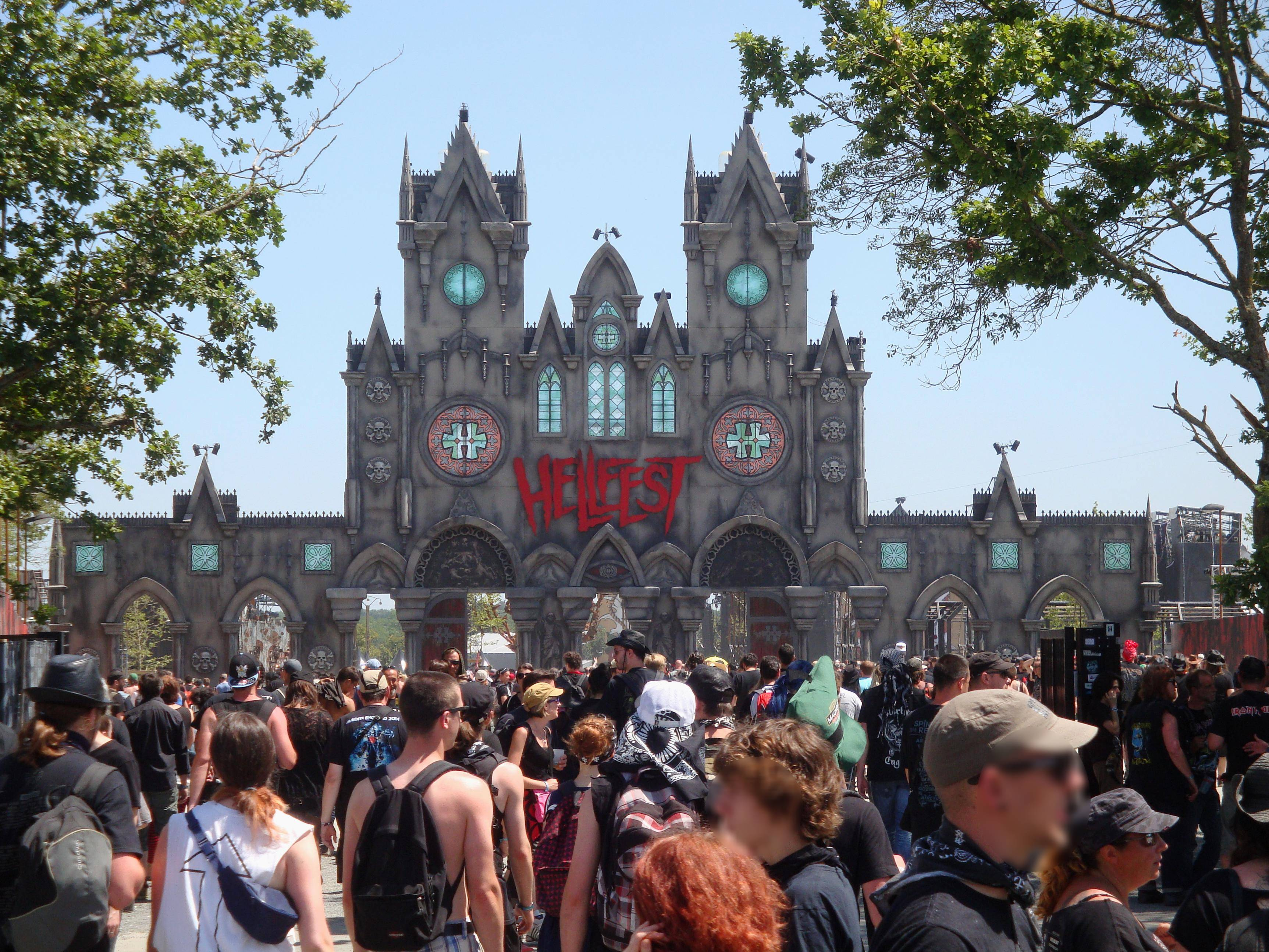 La Cathédrale / Entrée du site des concerts / 2015